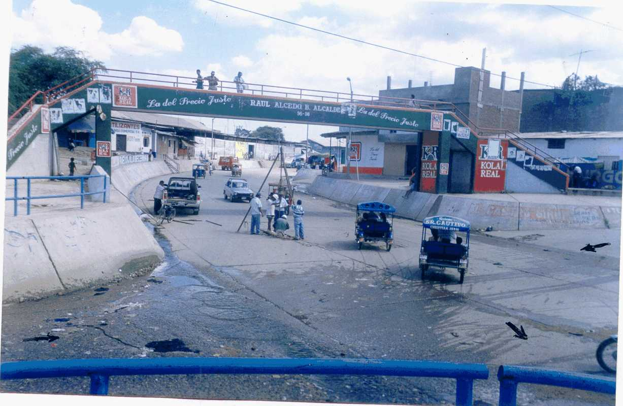 Vista del uso de la calle canal cuando no hay agua Vía Canal en la ciudad de Sullana. Autor: Alfredobi Lugar: Sullana en el norte del Perú Fecha: Agosto 2001